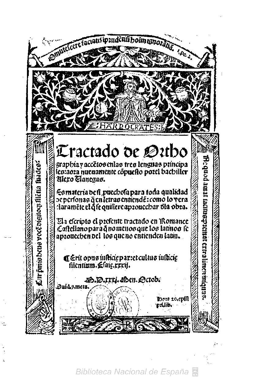 Tractado de orthographia y acce[n]tos en las tres lenguas principales aora nueuamente co[m]puesto por el bachiller Alexo Vanegas ... ; va escripto el presente tractado en romance castellano ... Autor: Venegas, Alejo Fecha: 1531 Datos de edición: Toledo en casa de Lazaro Saluago Ginoues ... Salvago, Lázaro (fl. 1527-1536)